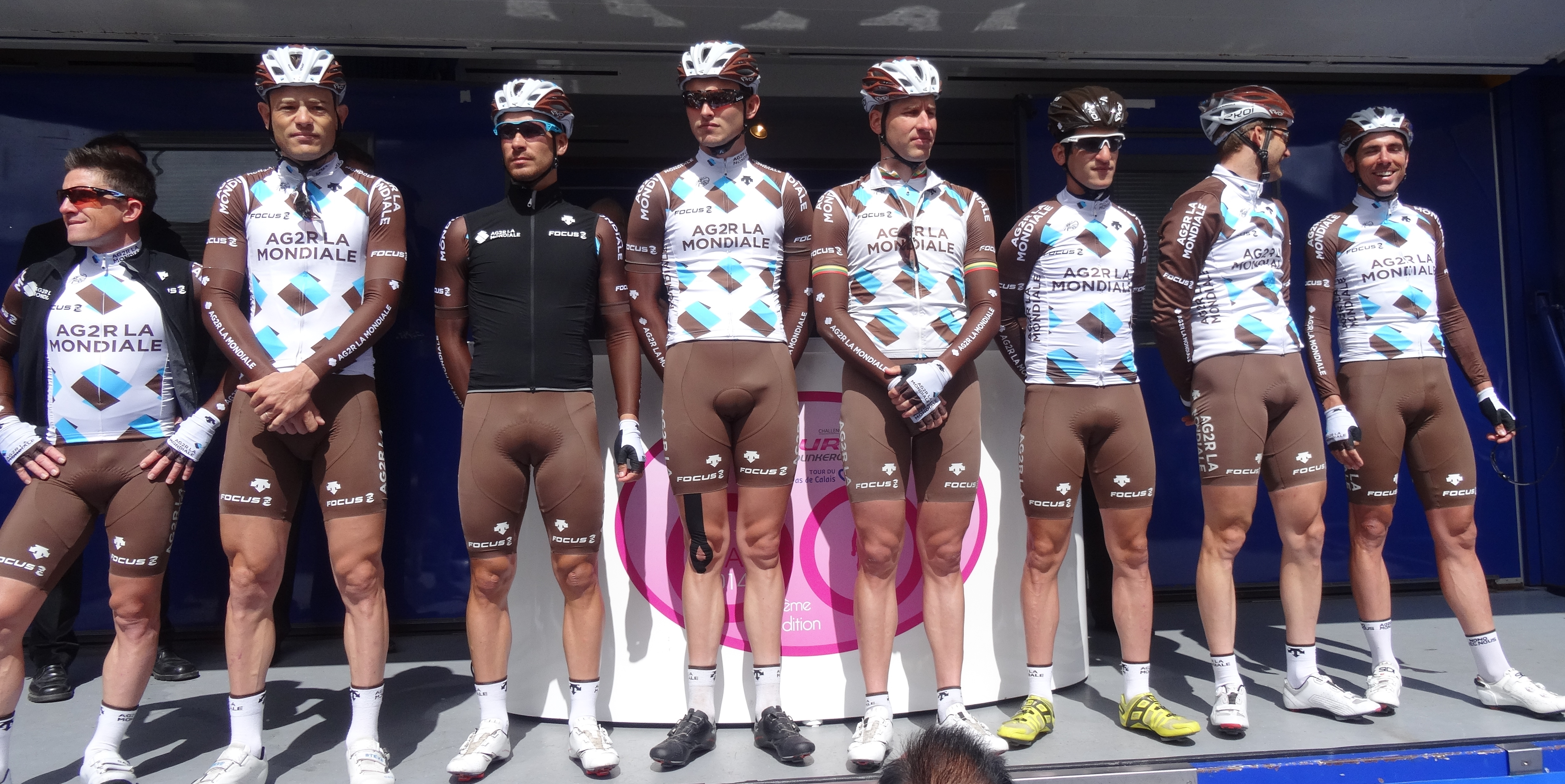 Reportage photographique réalisé le mercredi 7 mai 2014 au départ de la première étape de l'édition 2014 des Quatre jours de Dunkerque à Dunkerque, Nord, Nord-Pas-de-Calais, France. Depicted people: Samuel Dumoulin, Steve Chainel, Lloyd Mondory, Maxime Daniel, Gediminas Bagdonas, Blel Kadri, Hugo Houle and Sébastien Minard Depicted team: AG2R La Mondiale